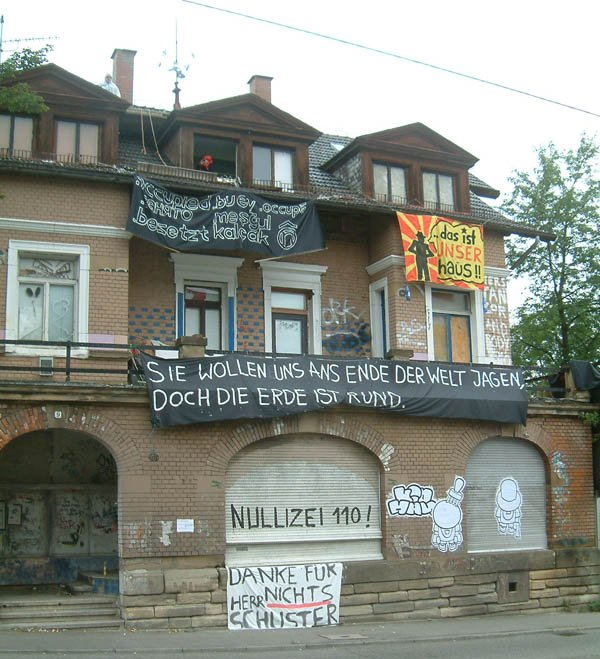 Das besetzte Haus Obere Weinsteige 9 (OBW9) in Stuttgart